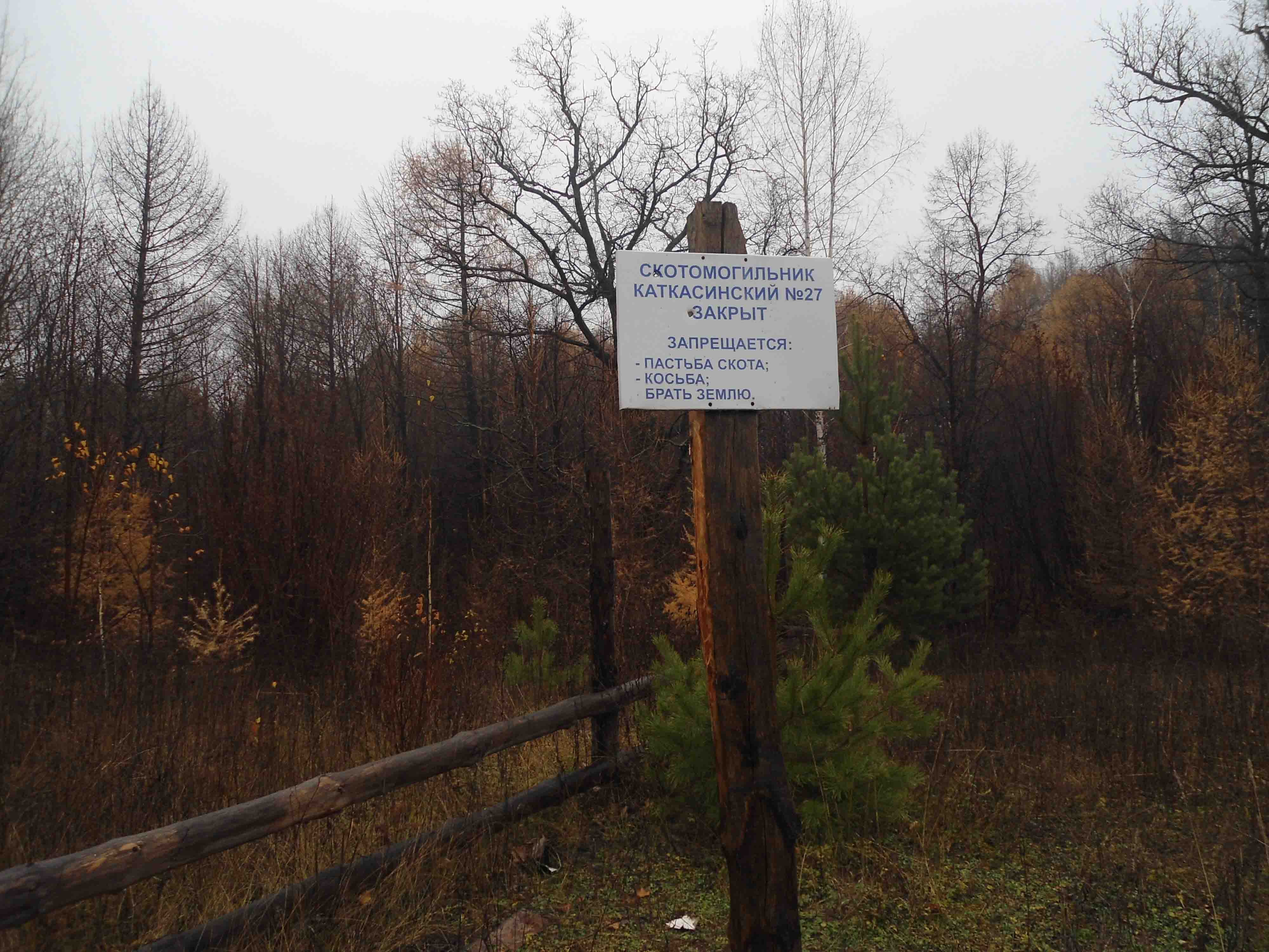 осторожно скотомогильник! carefully cattle cemetery!